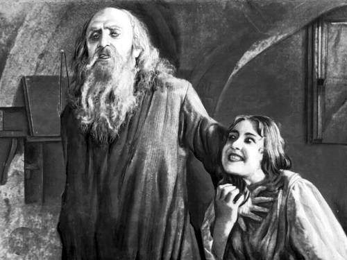 Кадр из фильма «Отец Сергий» (1918).